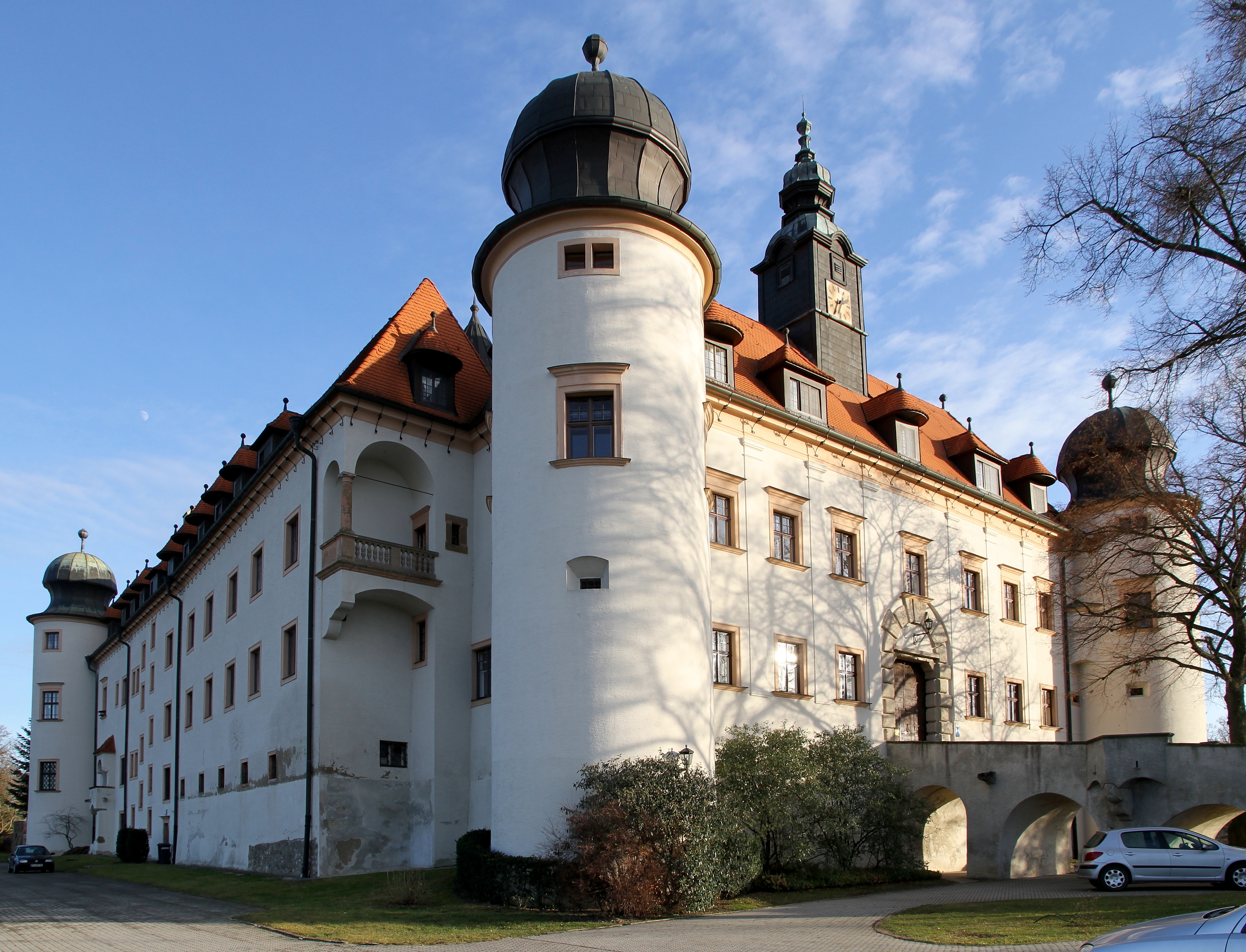 Nordwestansicht des Schlosses Sitzenberg in der niederösterreichischen Gemeinde Sitzenberg-Reidling.